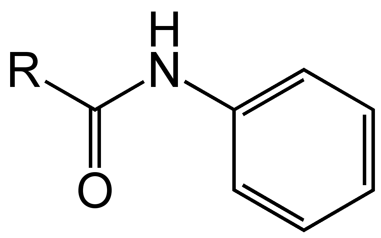 Allgemeine Strukturformel eines Carbonsäureanilids